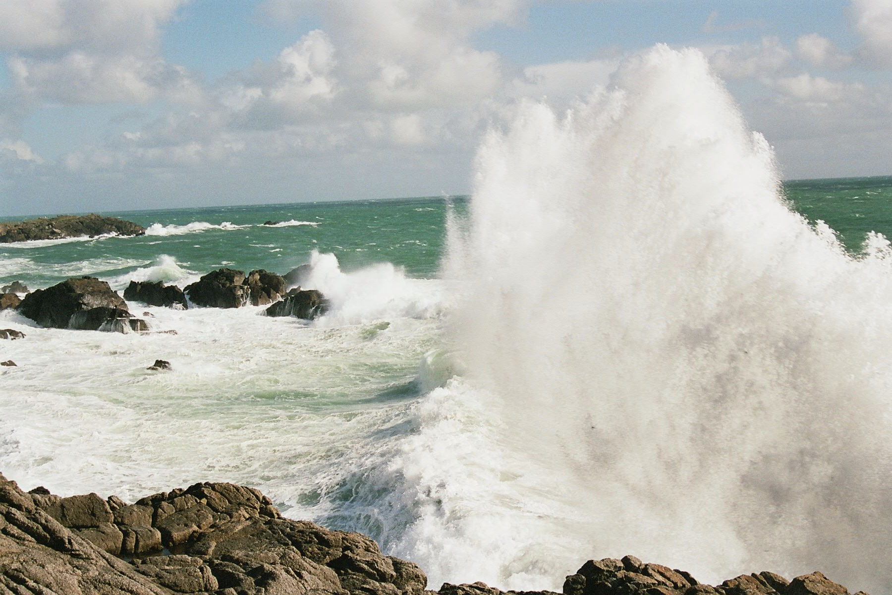 Vague, côte sauvage, île d'Yeu, 2004, S. Veyrié